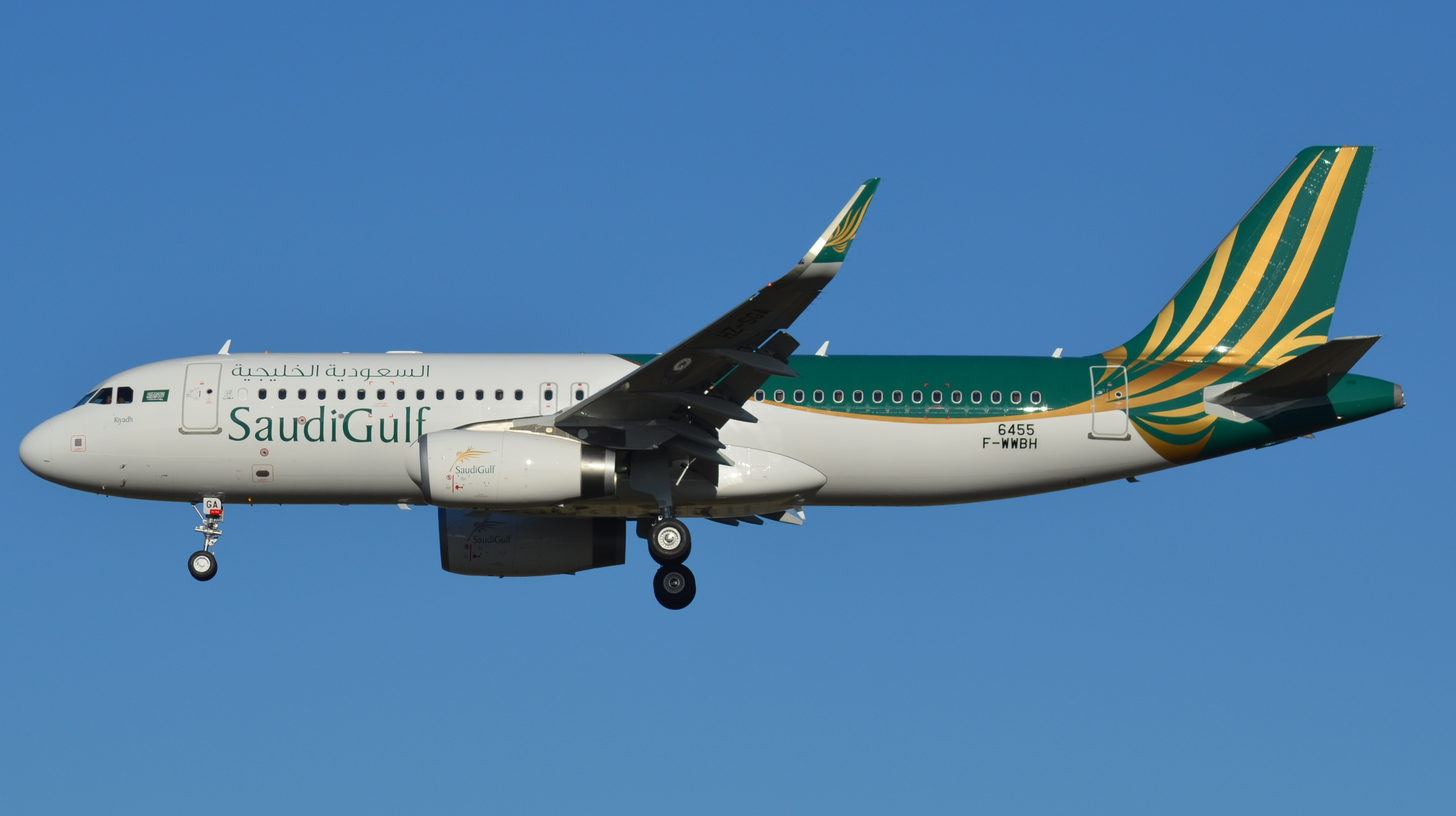 320.SHK SAUDIGULF F-WWBH 6455 09 02 15 TLS